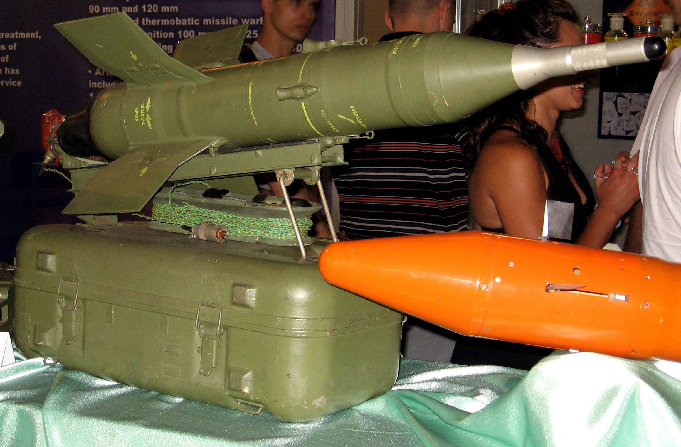 Russian anti-tank missile AT-3 Sagger.